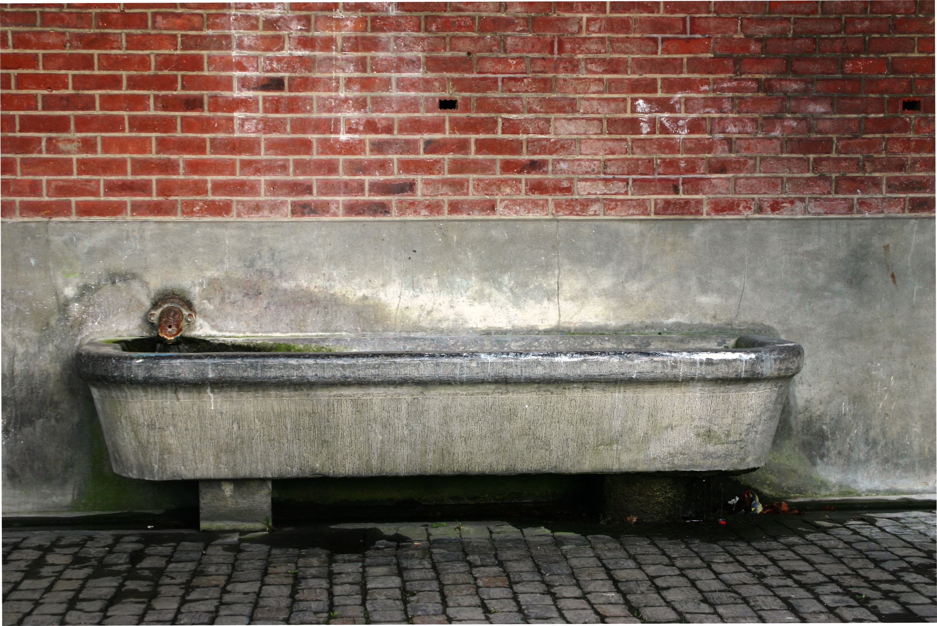 Ee vun de sechs Träch vun de Buren zu Herve.